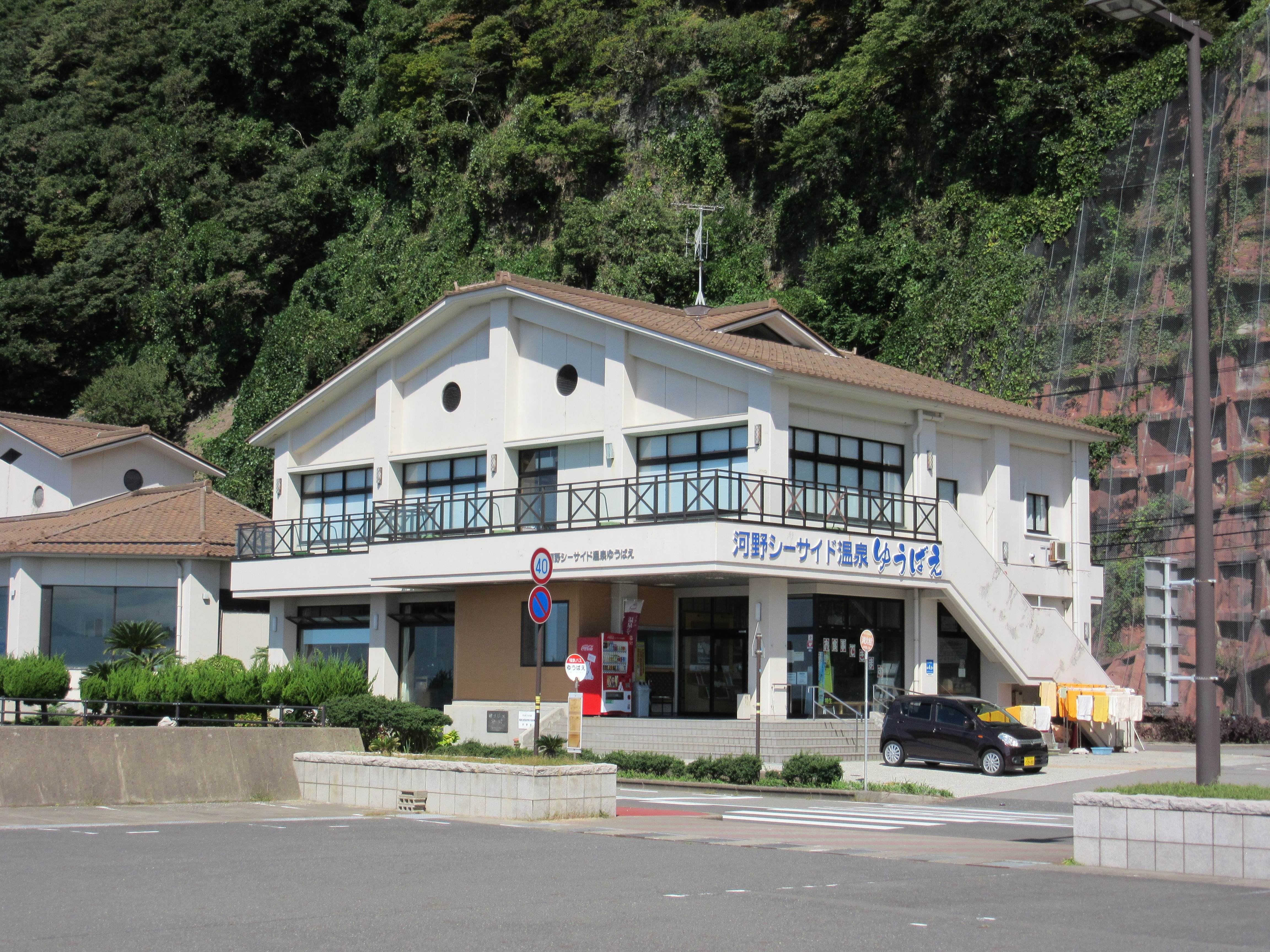 河野シーサイド温泉